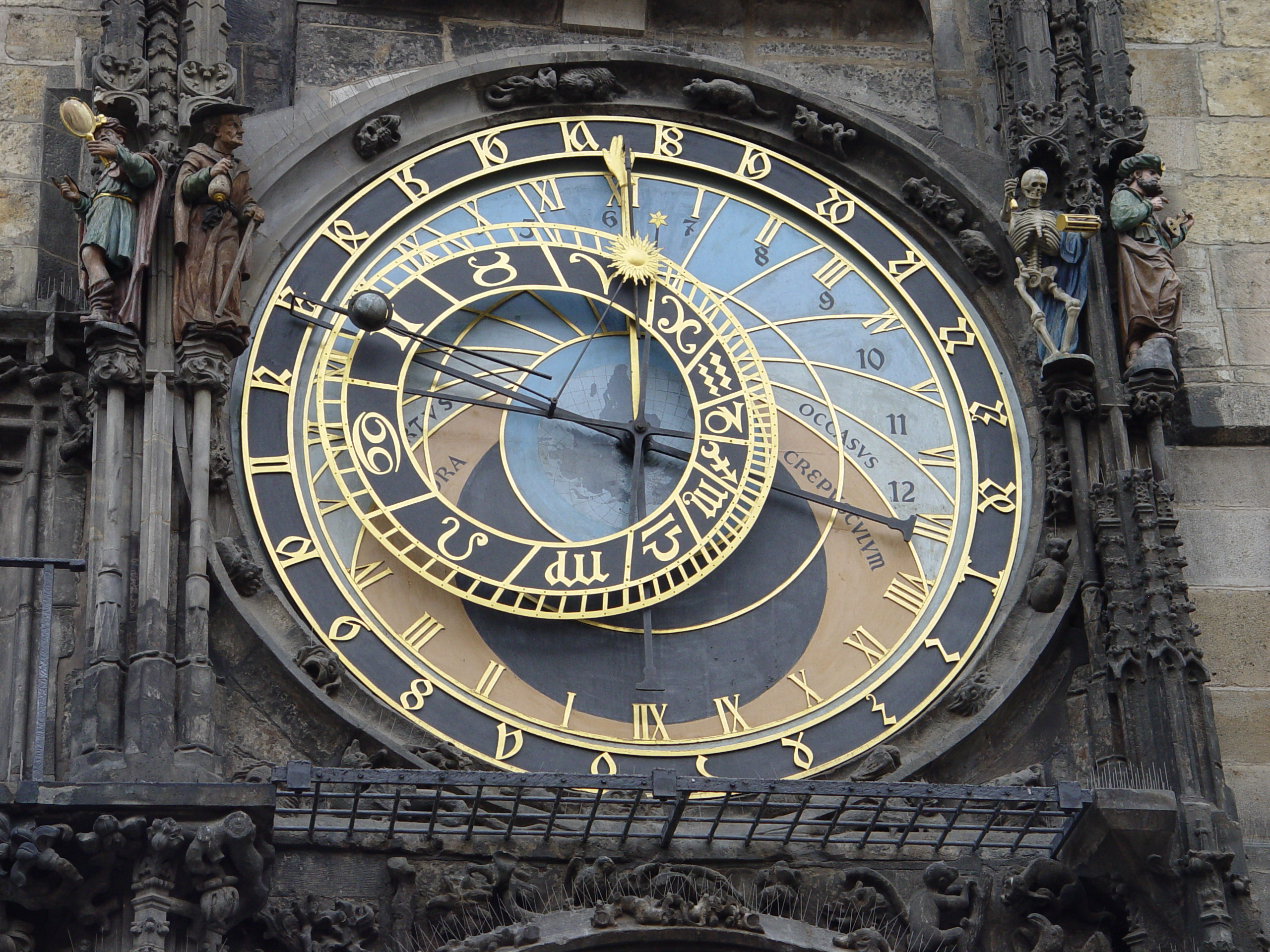 Prague - Astronomical Cock Detail